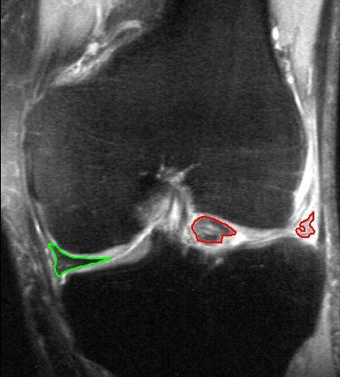 Korbhenkelriß des Außenmeniskus (rot). Leichte Verschleißerscheinung - keine Ruptur - des Innenmeniskus (grün). Kernspintomografie, koronare T2*-gewichtete GRE-Sequenz